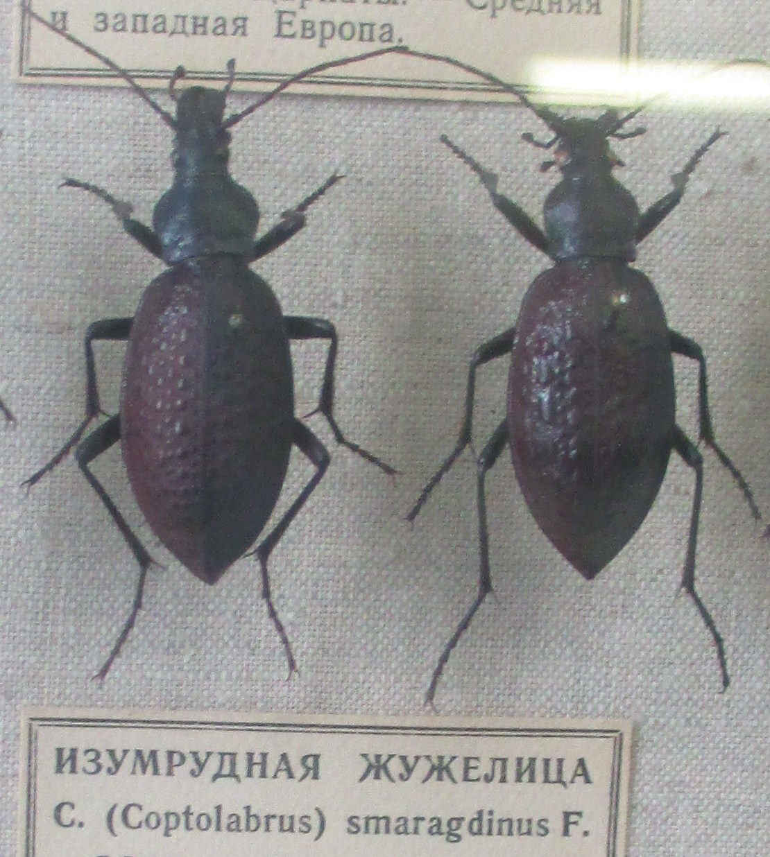 Musée zoologique de Saint-Pétersbourg - Carabus (Coptolabrus) smaragdinus